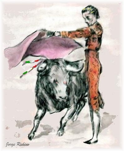 Dibujo sobre una lidia de toros (tauromaquia). No guarda relación alguna en particular con ningún torero. Aplicable a cualquier figura del mundo del toreo.